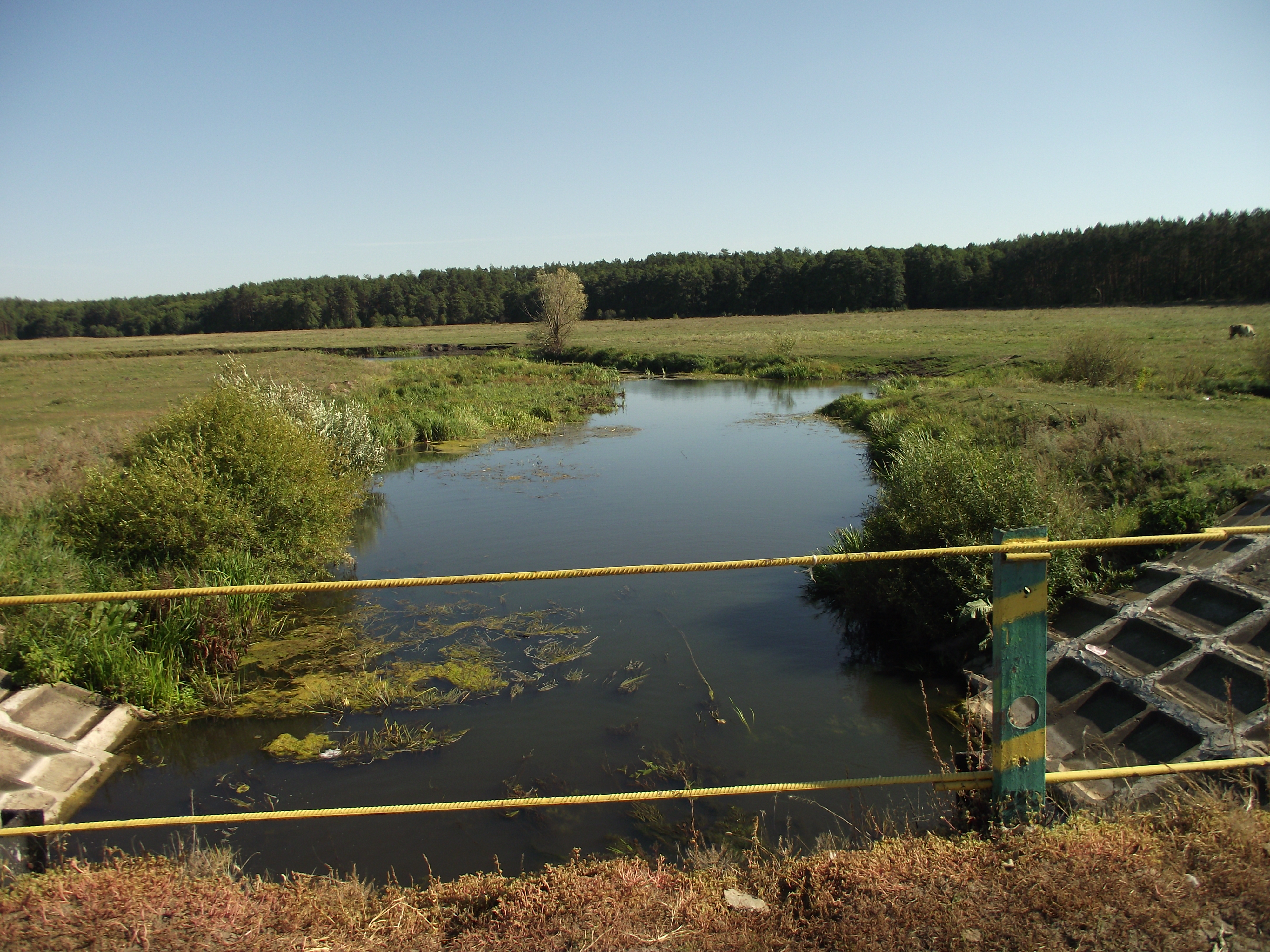 Міст через річку Ірпінь у Чорногородці.